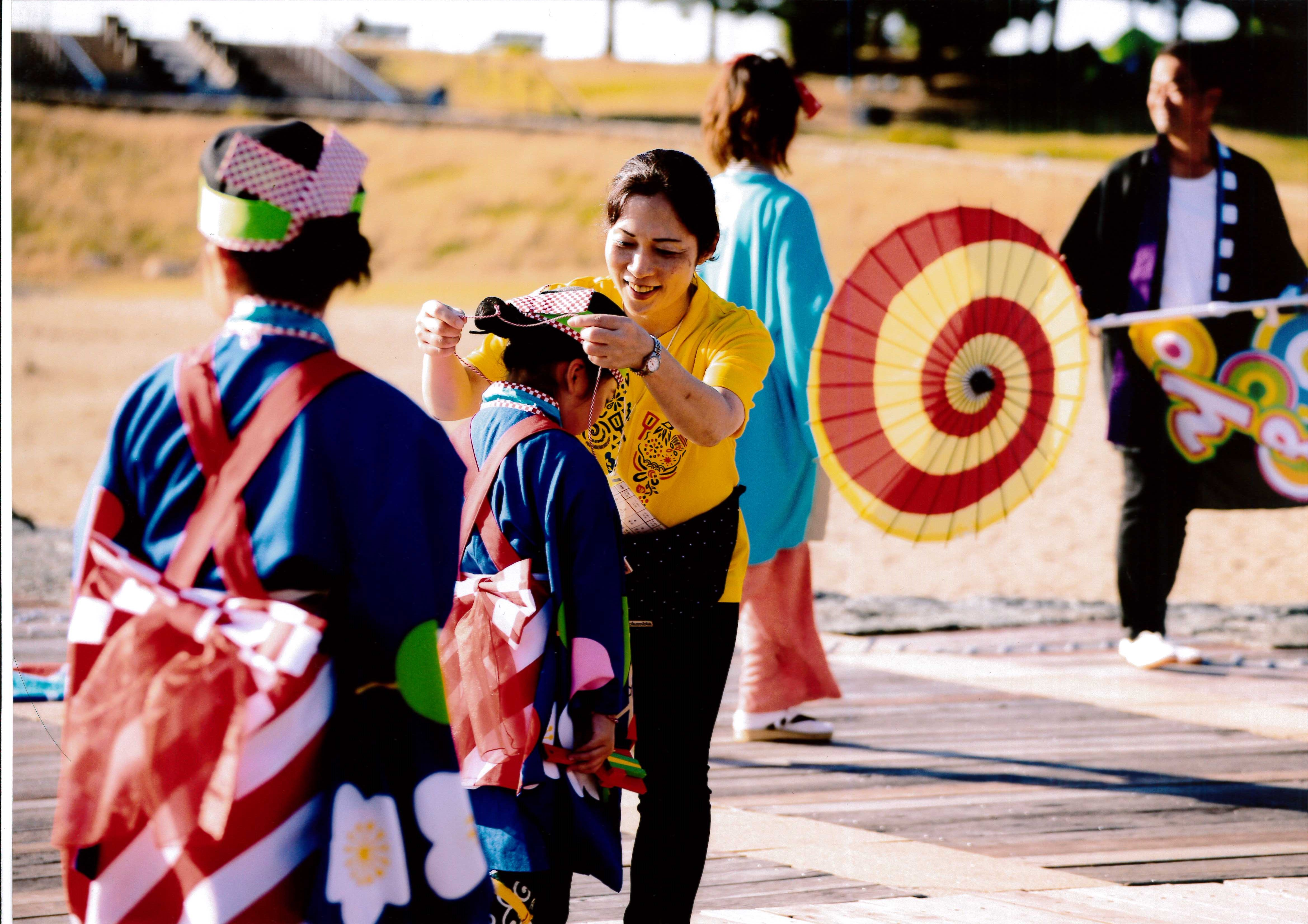 各会場での演舞毎に、出演者の中から一人優秀賞を決定する。